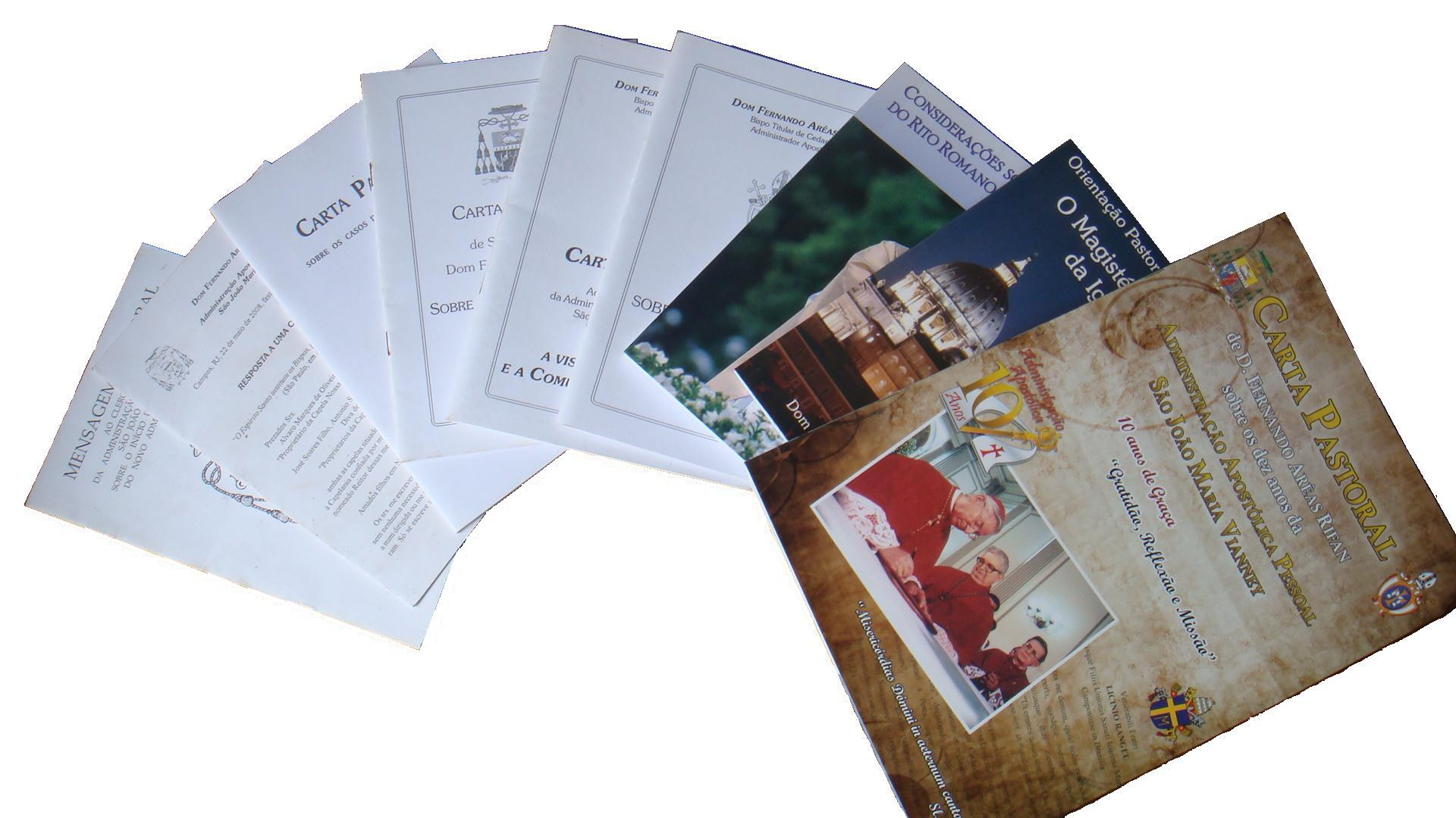 As Cartas Pastorais de Dom Fernando Rifan, Ordinário da Administração Apostólica São João Vianney, escritas de 2002 a 2013.